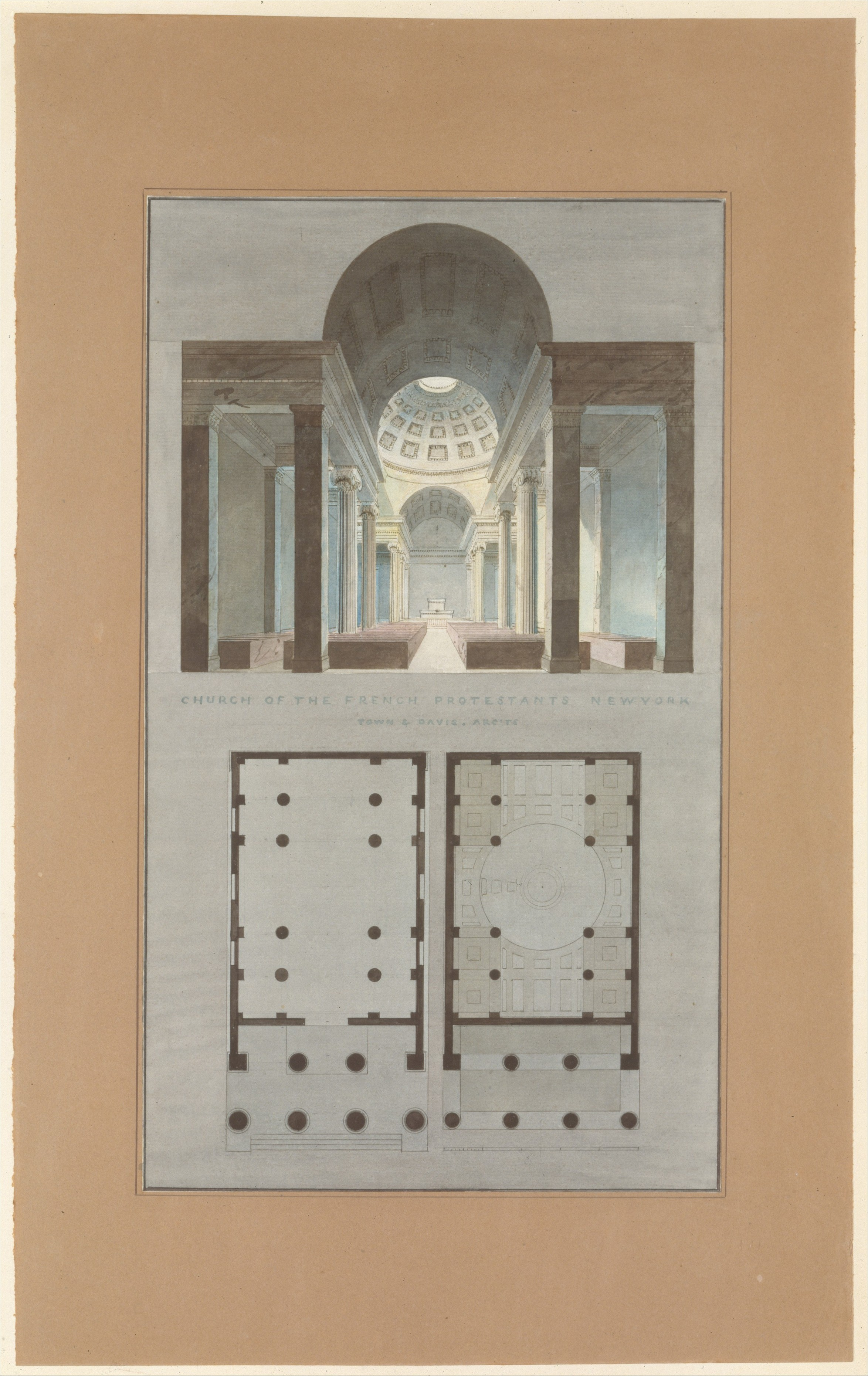 Drawing; Drawings